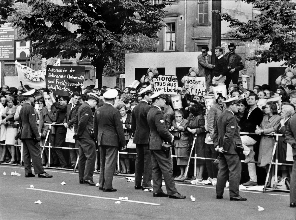 Ludwig Binder: Studentenrevolte 1967/68, West-Berlin; veröffentlicht vom Haus der Geschichte der Bundesrepublik Deutschland